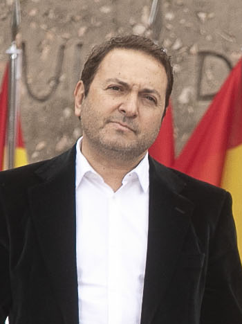 Concentración en Plaza de Color por la unidad de España.